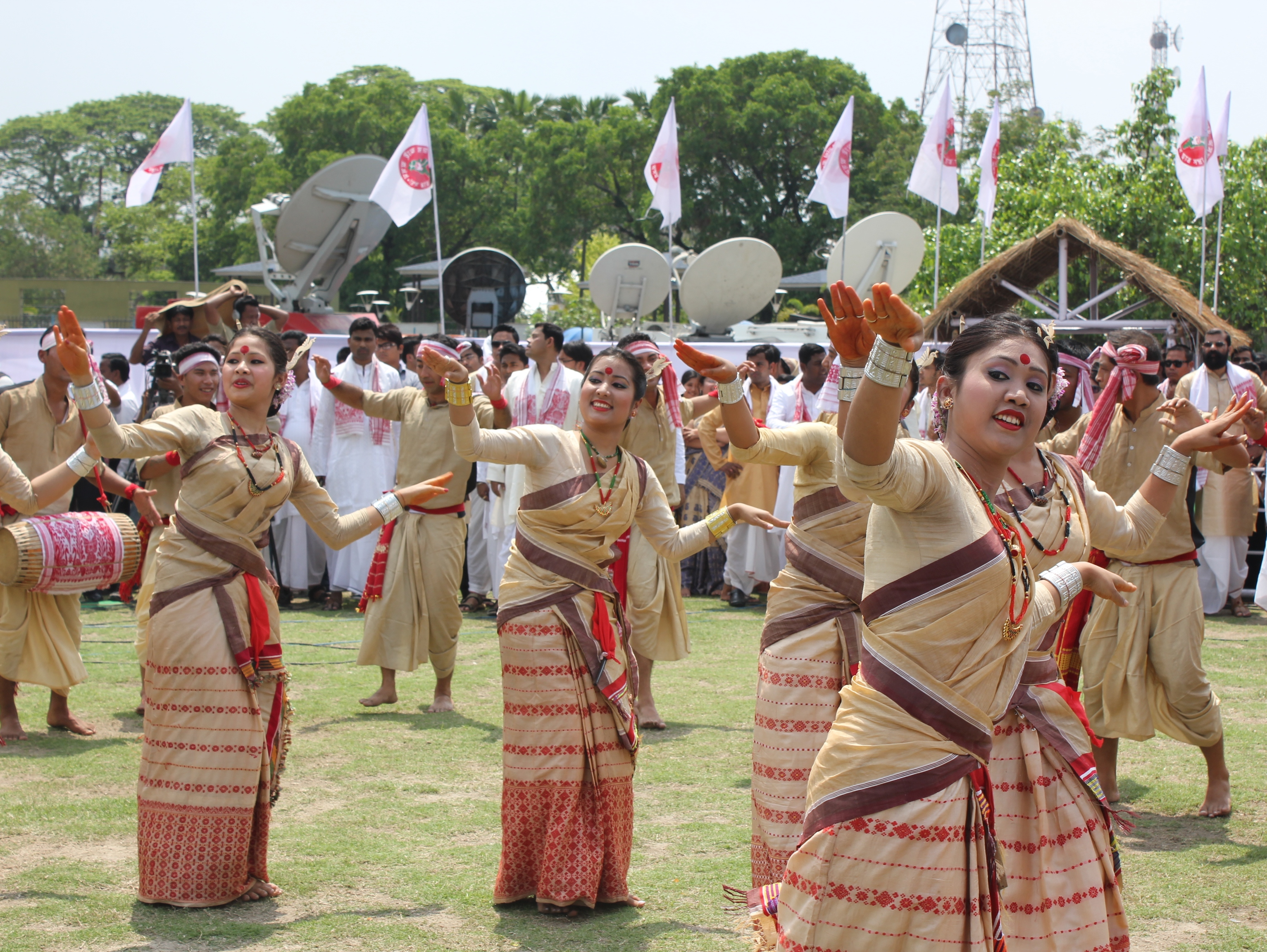 অসমীয়া: সদৌ গুৱাহাটী ছাত্র সংস্থাৰ দ্বাৰা গুৱাহাটীৰ জাজেচ খেলপথাৰত আয়োজিত মুকুলি বিহু(১৩-০৪-২০১২)ৰ এটি দৃশ্য।